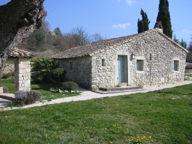 Mas des Bouches du Rhone (vers Aix-en-Provence)